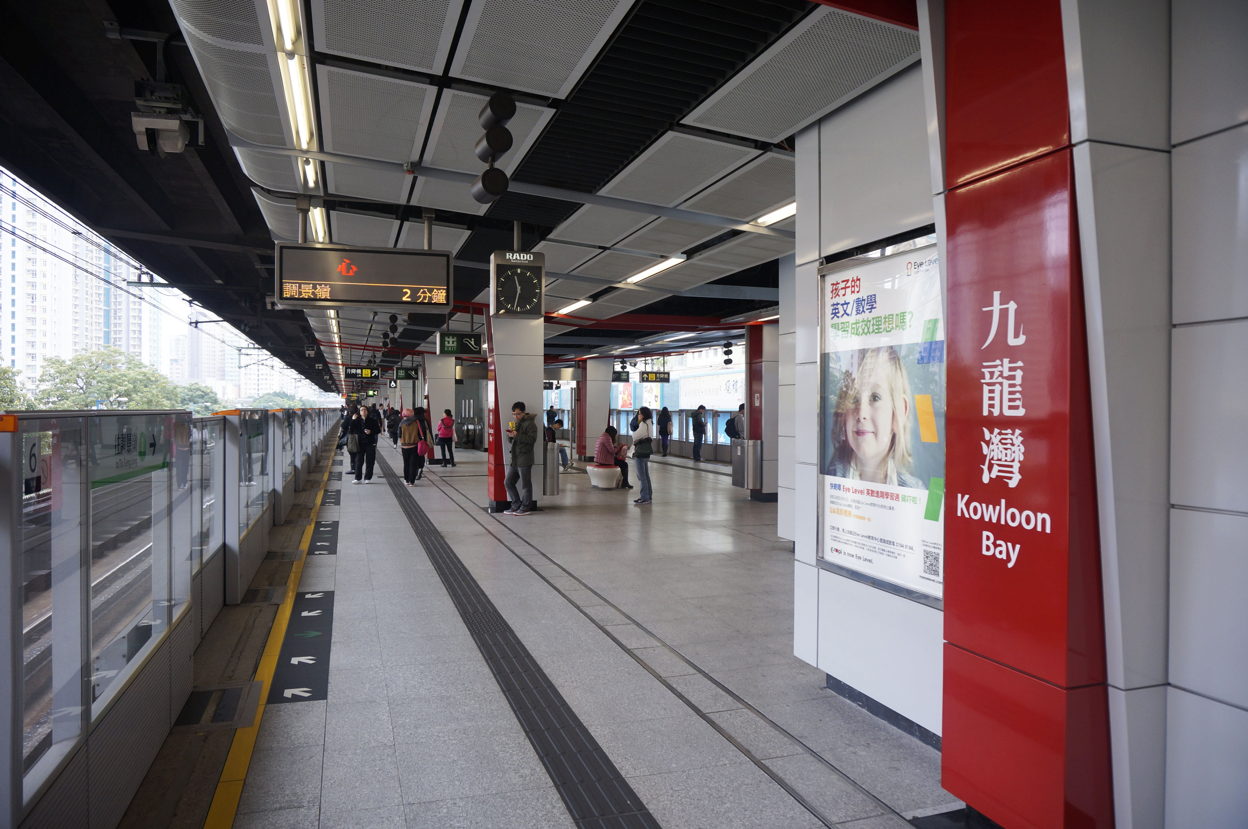 港鐵九龍灣站月台